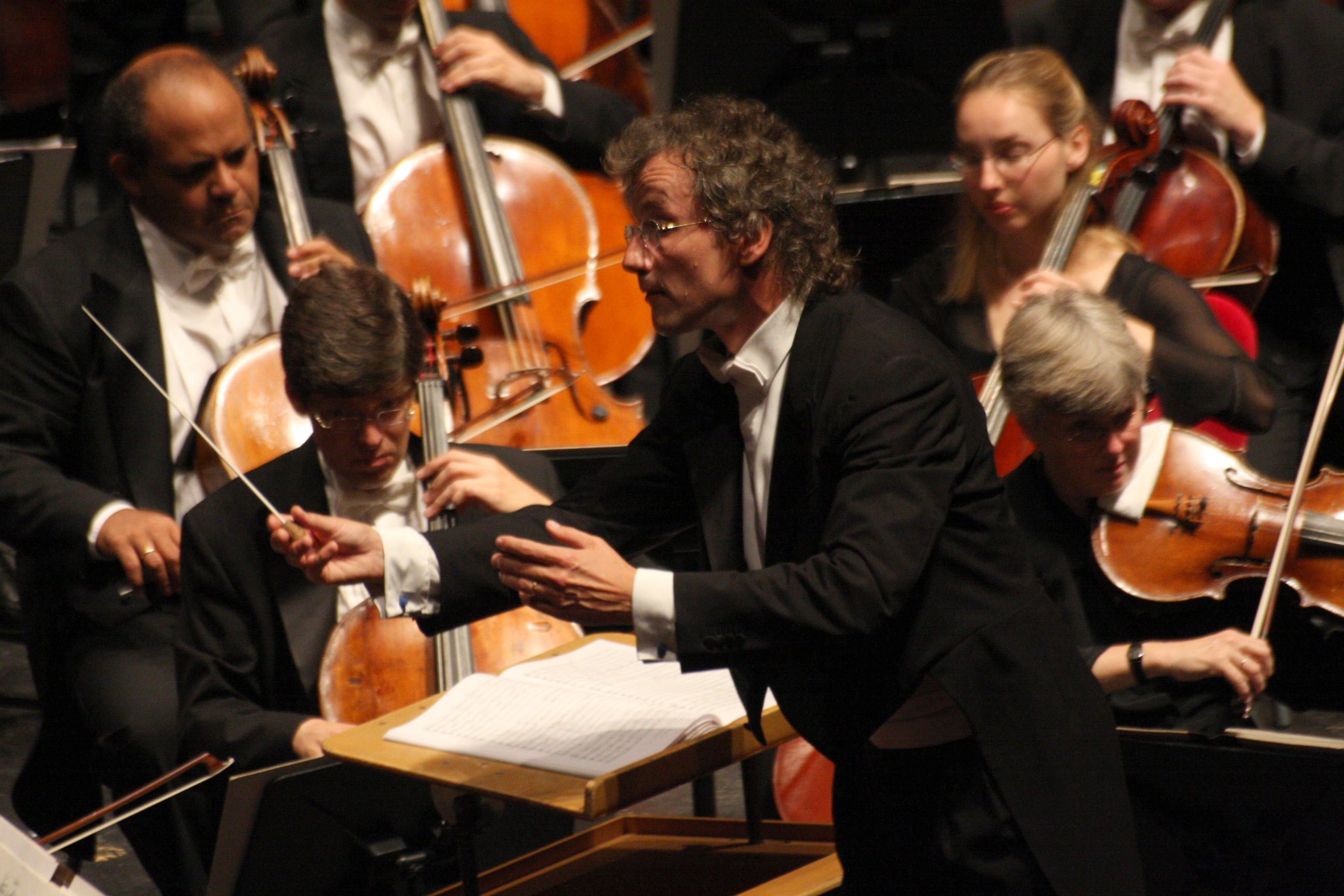 Torino 2 settembre 2008 Teatro Regio The Cleveland Orchestra Franz Welser-Möst, direttore